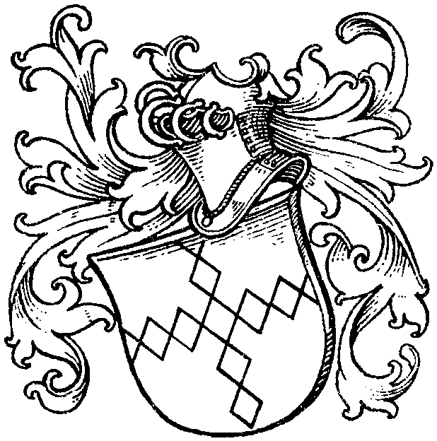 Wappen der westfälischen ritterbürtigen von Luttel(e)nau.